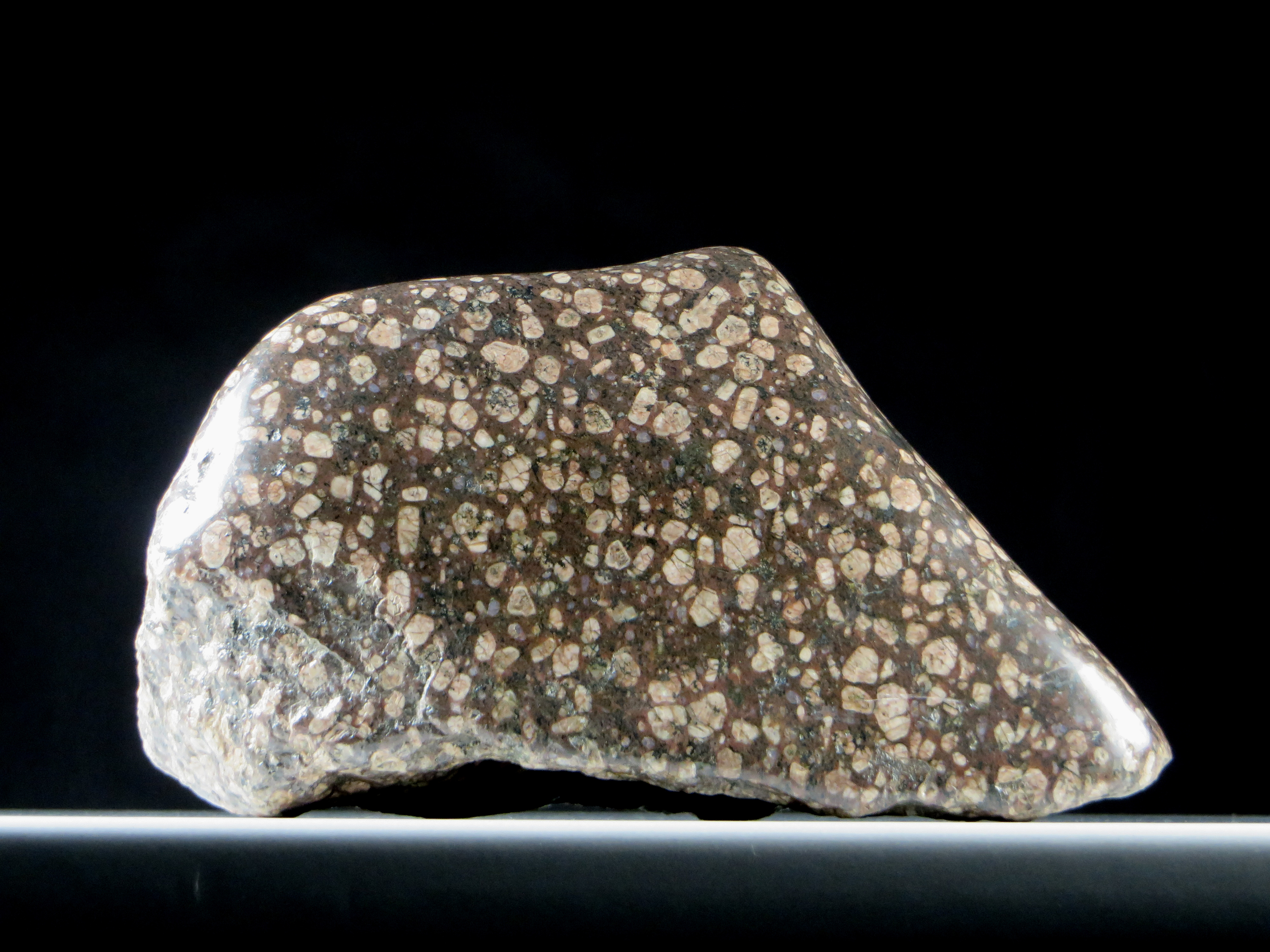 Påskallavik-Porphyr; Herkunft: Påskallavik (Schweden); Alter: Präkambrium Fundort: Kiesgrube Bochow bei Damsdorf